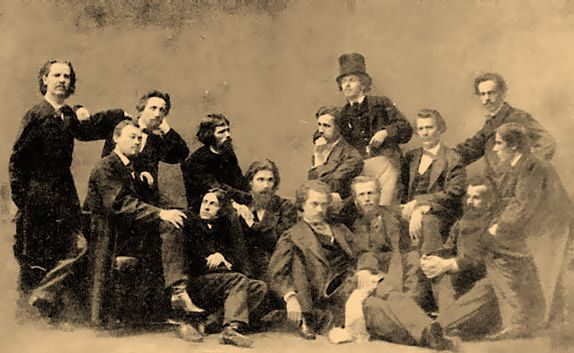 Санкт-Петербургская Артель художников. 1863-1864, Фотография. Слева направо: Б.Б. Вениг, Ф.С. Журавлев, А.И. Морозов, И.Н. Крамской, К.В. Лемох, А.Д. Литовченко, К.Е. Маковский, Н.Д. Дмитриев, Н.П. Петров (стоит), В.П.Кретайн, М.И. Песков, Н.С. Шустов, А.И. Корзухин, А.К. Григорьев.